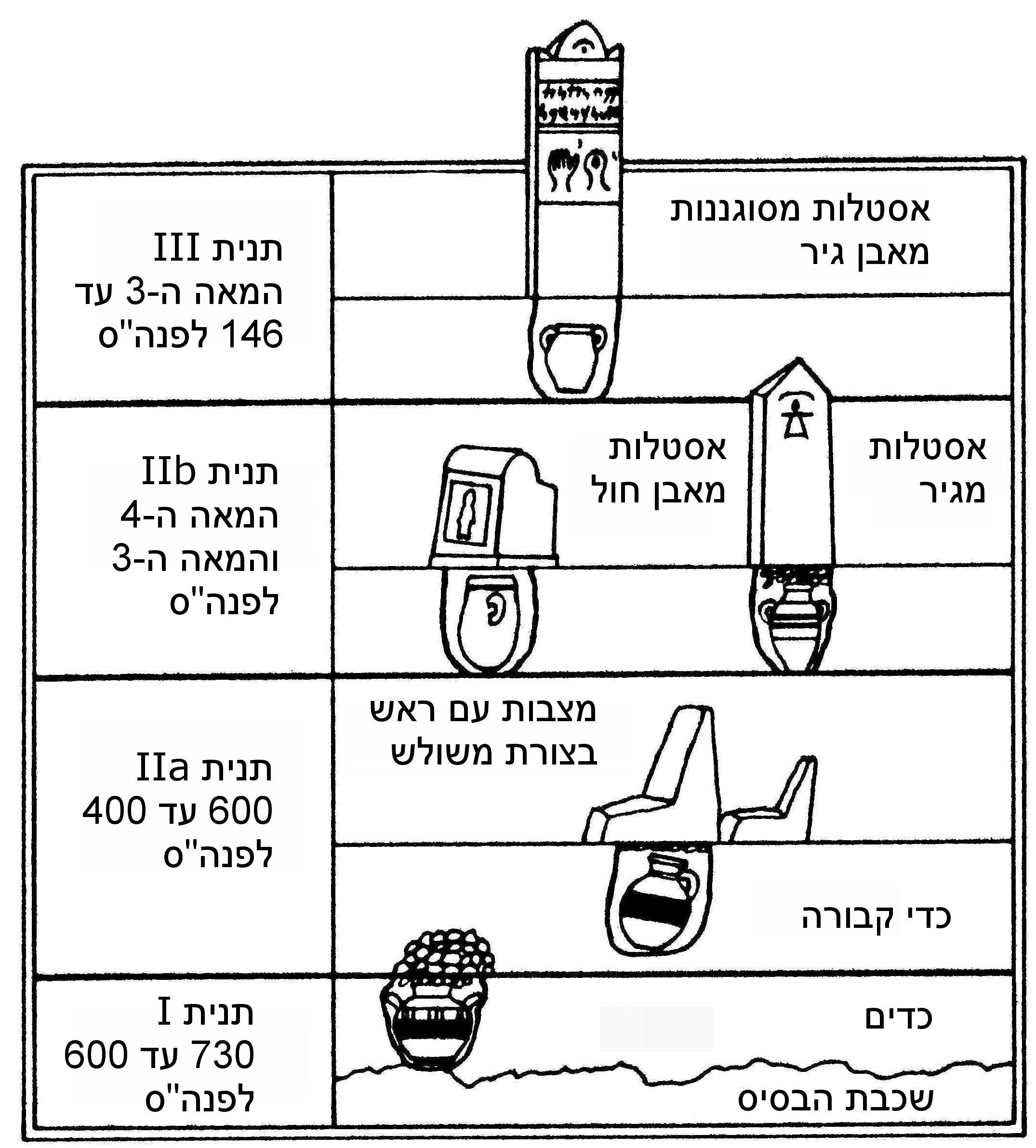 Stratigraphie du tophet de Carthage